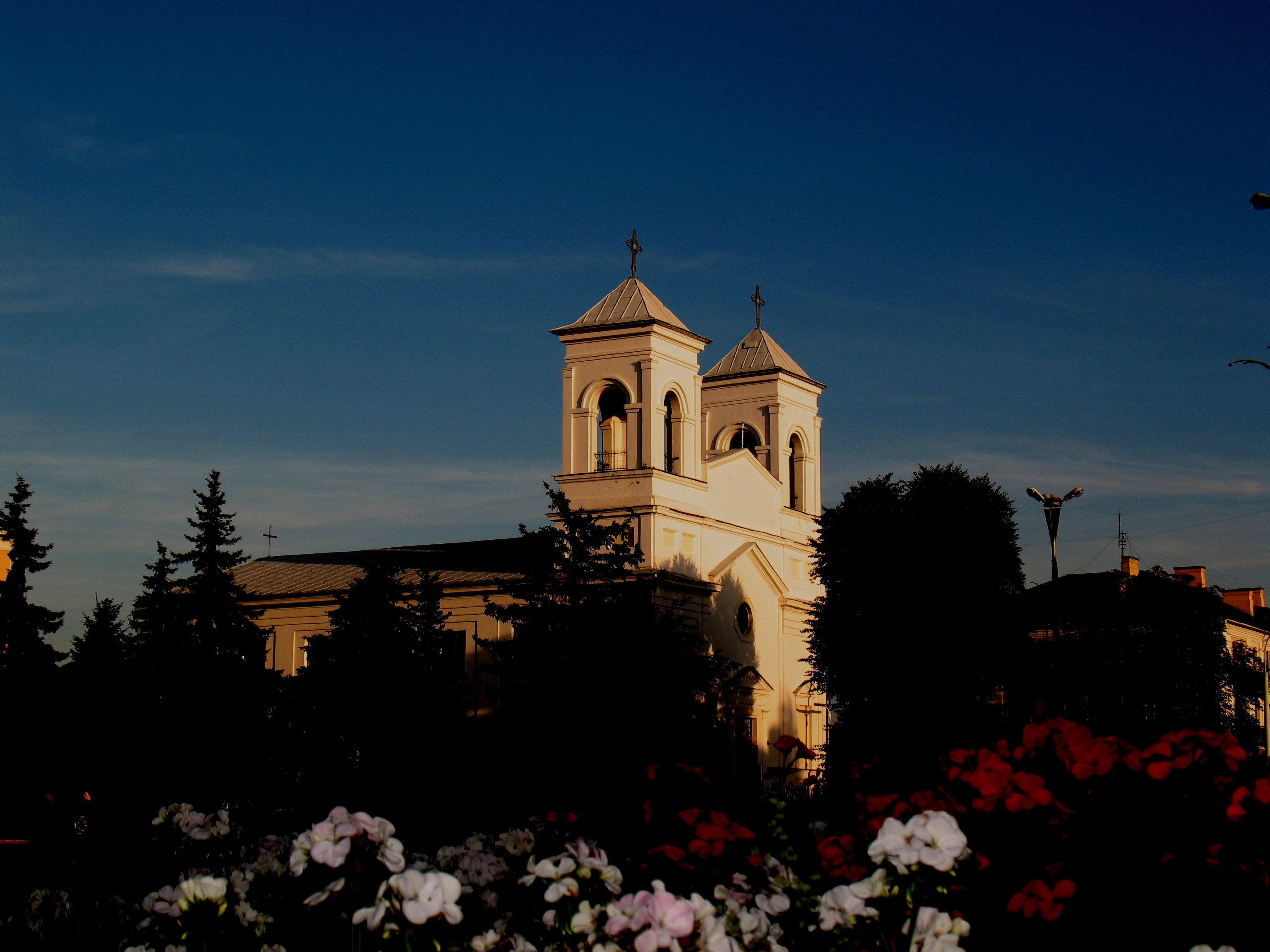 Беларуская (тарашкевіца): Катэдральны касьцёл Сьвятога Крыжа. г. Берасьце This is a photo of Belarusian heritage monument. Reference number: 113Г000015 ( WLM)